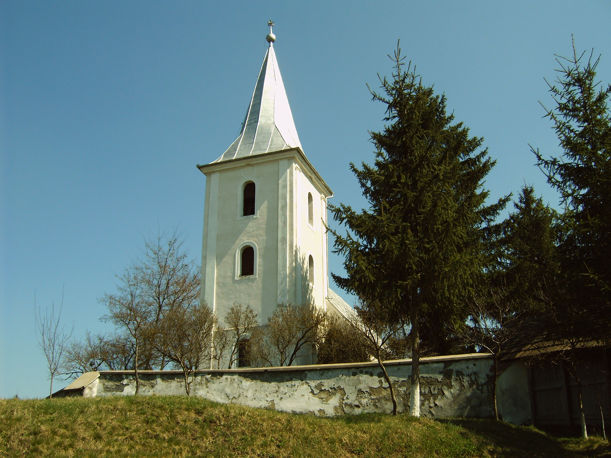 Magyarkirályfalvi református templom